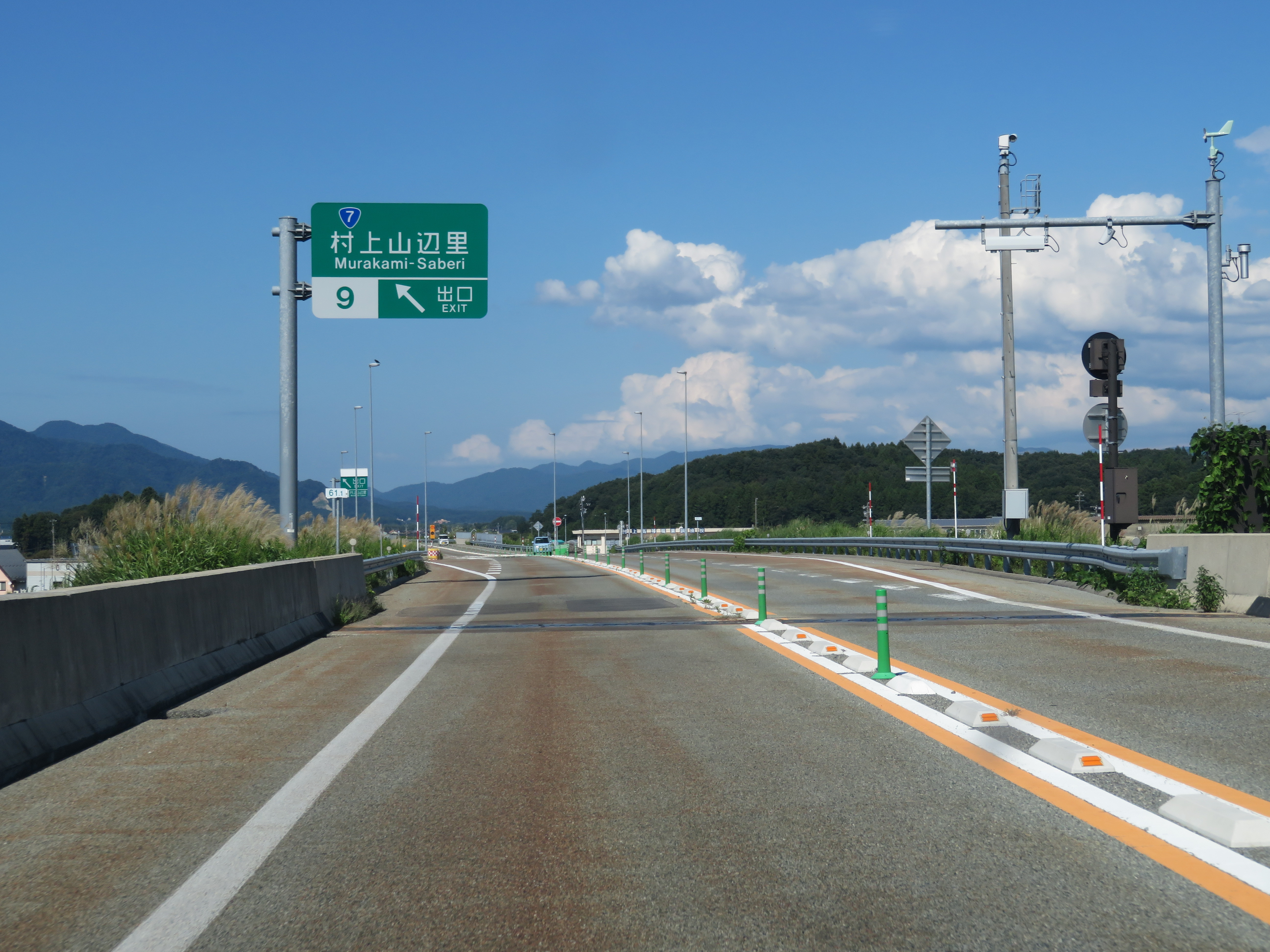 日本海東北自動車道村上山辺インターチェンジ出口付近（新潟方面側から撮影）